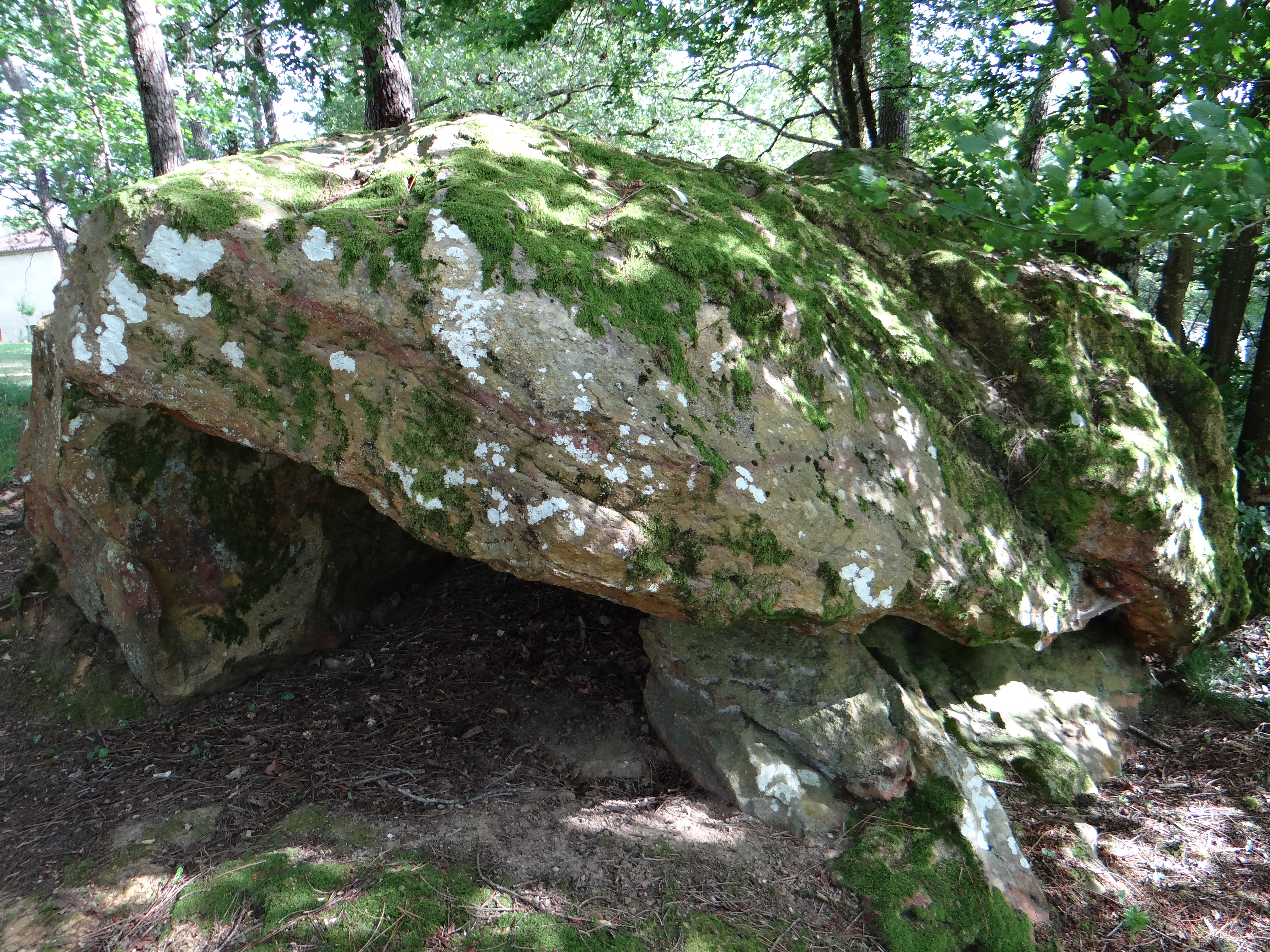 Vergt-de-Biron (Labrame) - Allée du Point du Jour